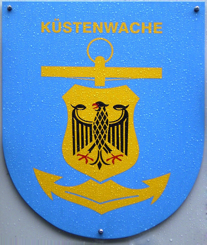 Wappen der deutschen Küstenwache. Aufgenommen am ehemaligen Zollkreuzer "Oldenburg" im Deutschen Zollmuseum Hamburg